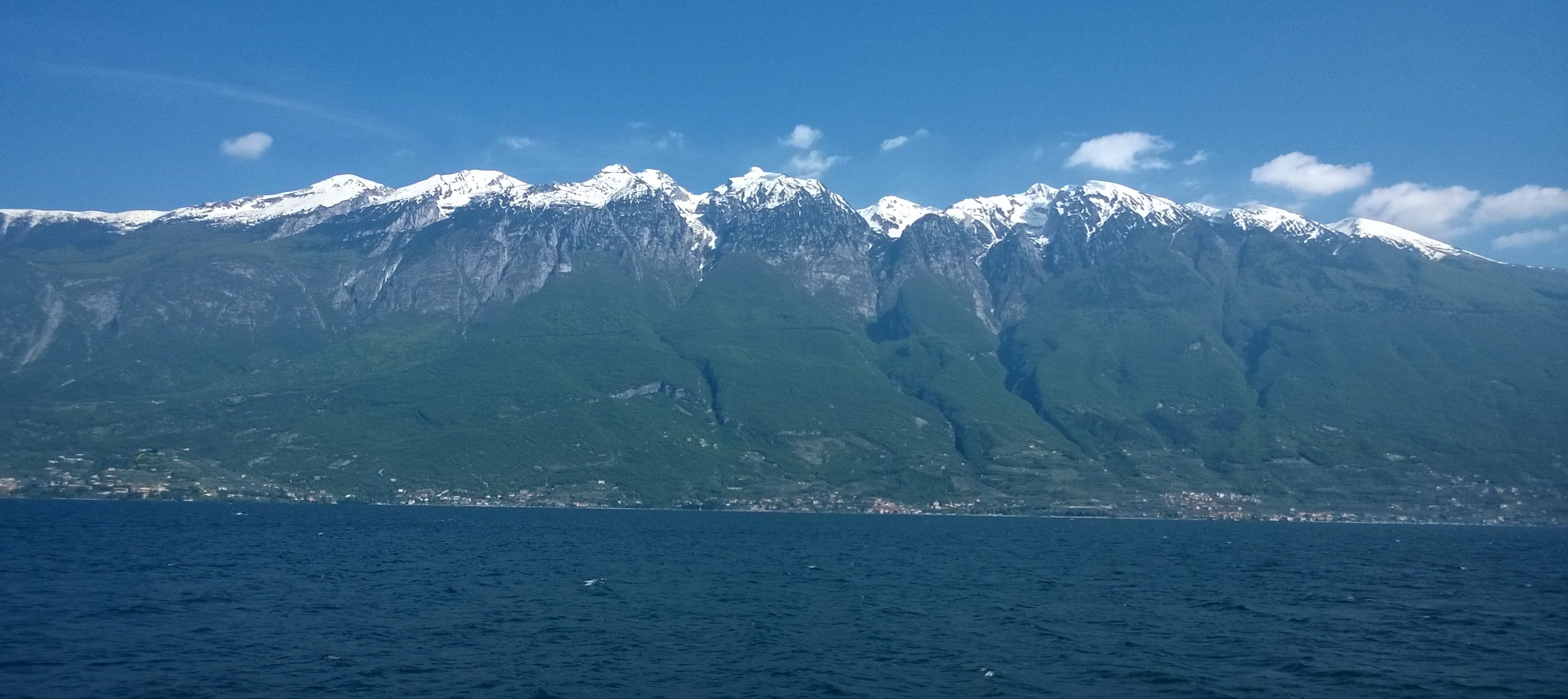 Il Monte Baldo visto da Campione del Garda in data 5 Maggio 2014